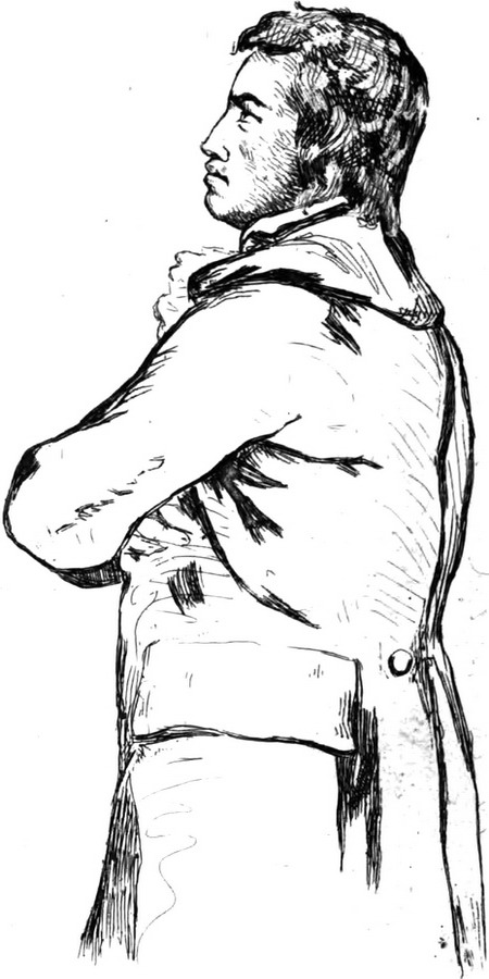 Portrait de Joseph Le Bon par Jeanron